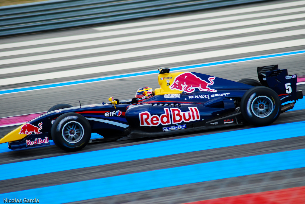 5 Jean-Éric Vergne - Carlin, wins race 1 - 2011 Formula Renault 3.5 Series - Circuit Paul Ricard - Race 1